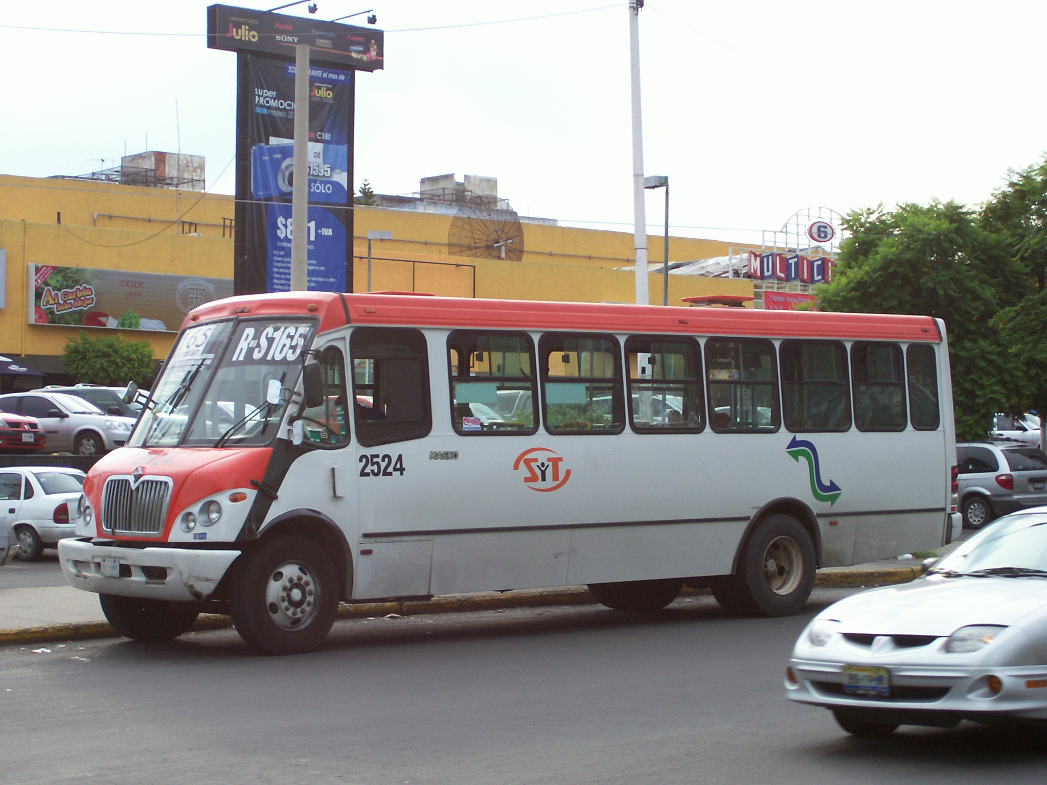 Autobus suburbano de servcios y Transportes.